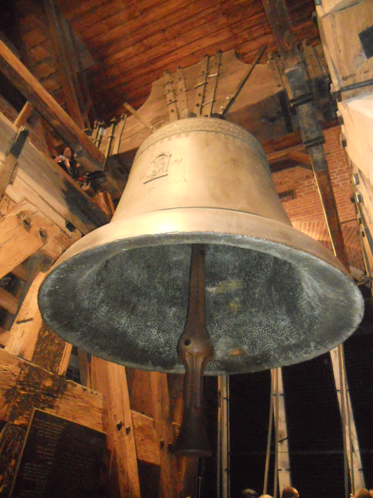 Dzwon Zygmunt na krótko przed biciem na cześć królów, 2 listopada 2012, Wawel, Kraków.